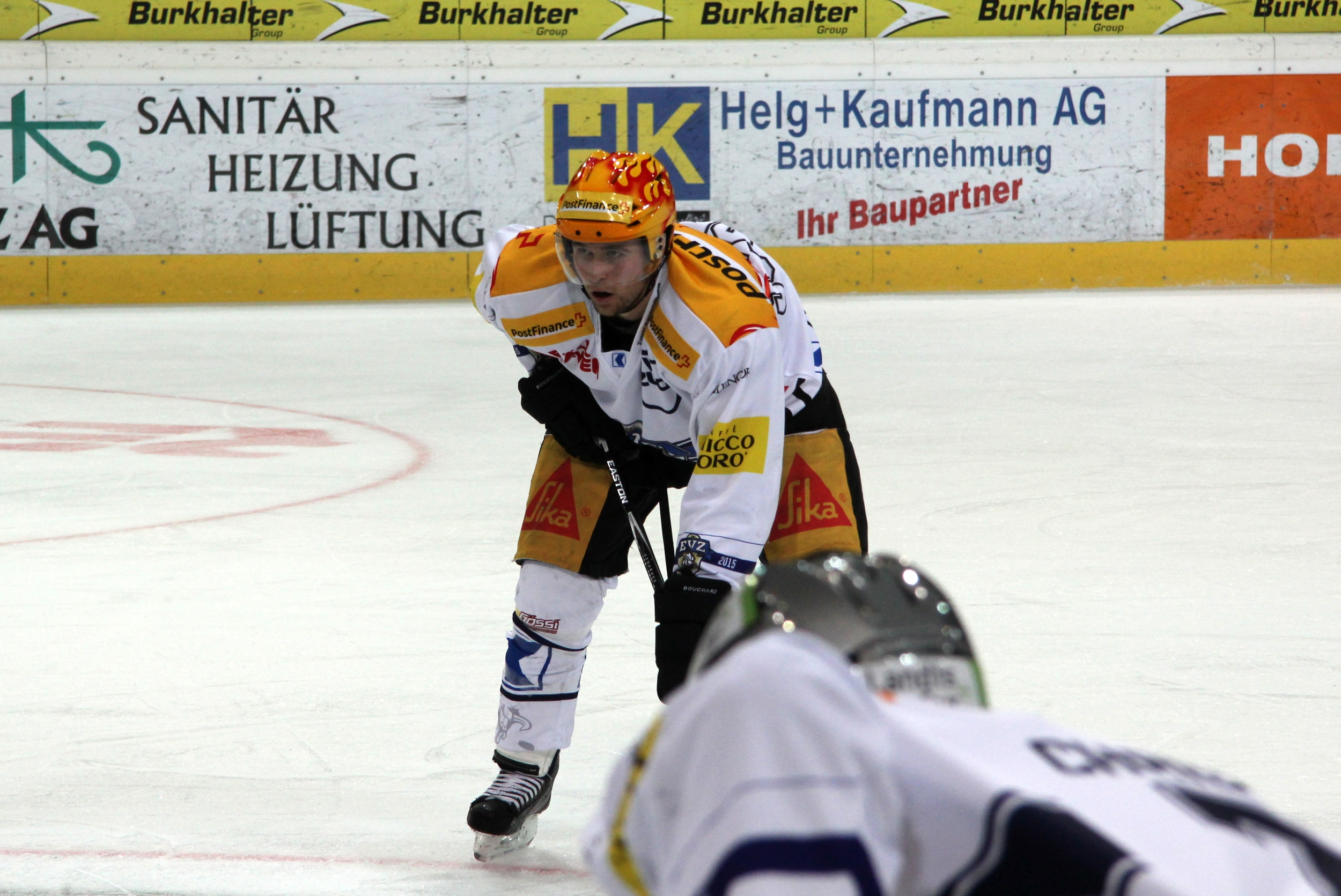 Pierre-Marc Bouchard (Z 96, TS).